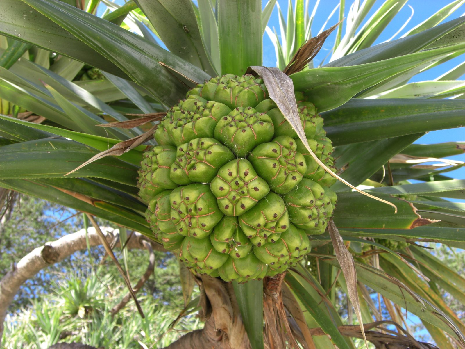 Arbre aux fruits étranges dans le Queensland